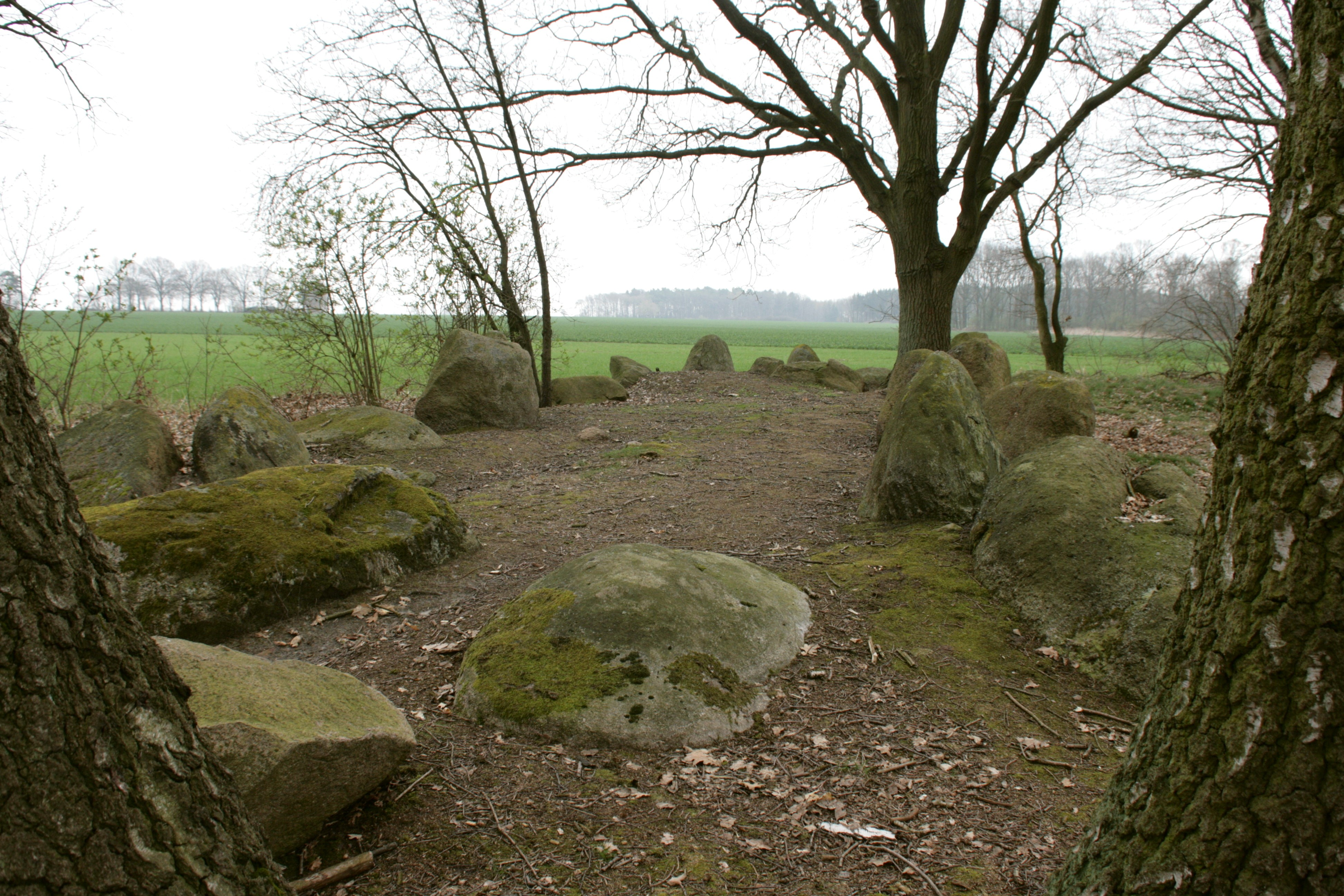 so genannte Königsgräber in Altenmedingen-Haaßel